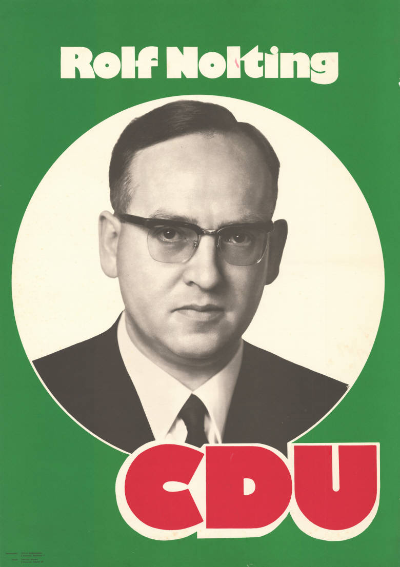 Rolf Nolting CDUAbbildung:PorträtfotoPlakatart:Kandidaten-/Personenplakat mit PorträtAuftraggeber:CDU in Niedersachsen, HannoverDrucker_Druckart_Druckort:Gebrüder Jänecke, HannoverObjekt-Signatur:10-008 : 318Bestand:Landtagswahlplakate Niedersachsen (10-008)GliederungBestand10-18:Landtagswahlplakate Niedersachsen (10-008) » CDULizenz:KAS/ACDP 10-008 : 318 CC-BY-SA 3.0 DE